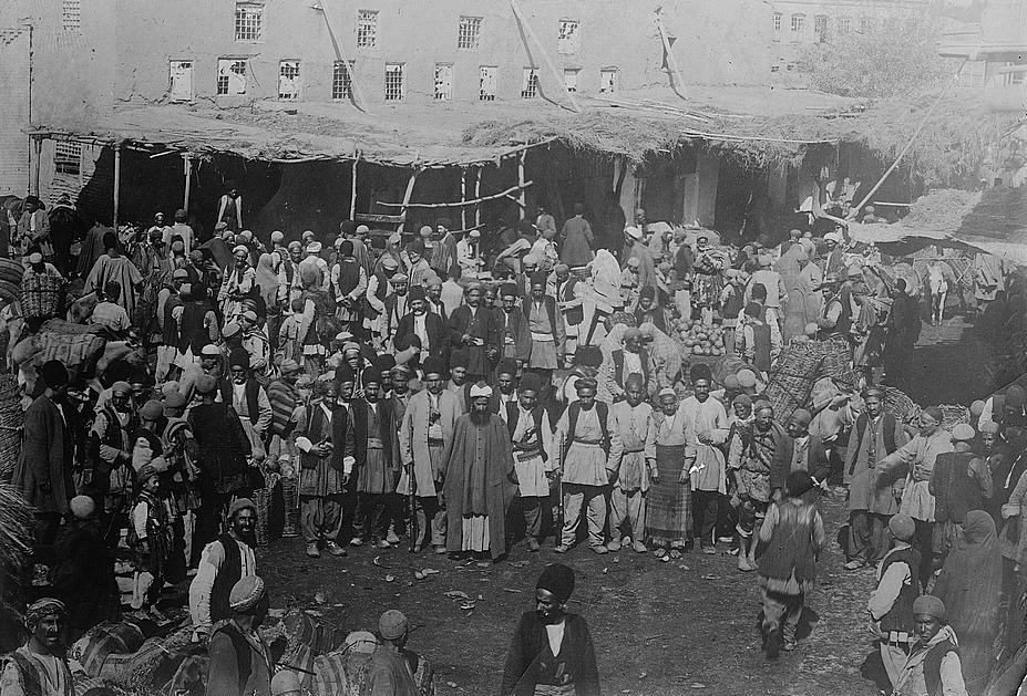 Fruit Market in Ourmiah, Persia.